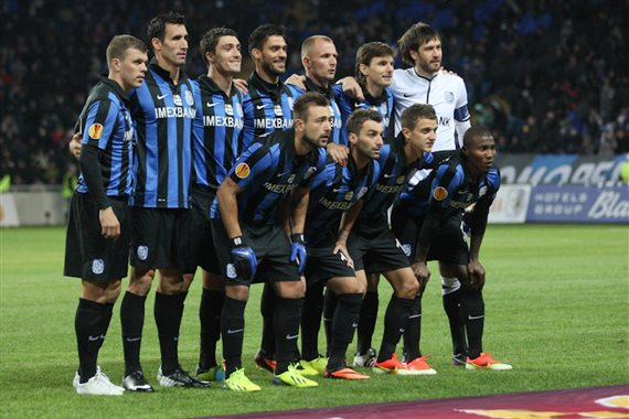 ФК Чорноморець 4 жовтня 2013 року перед матчем з нідерландським ПСВ.